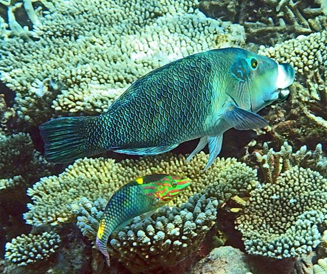 Hemigymnus melapterus e Halichoeres hortulanus